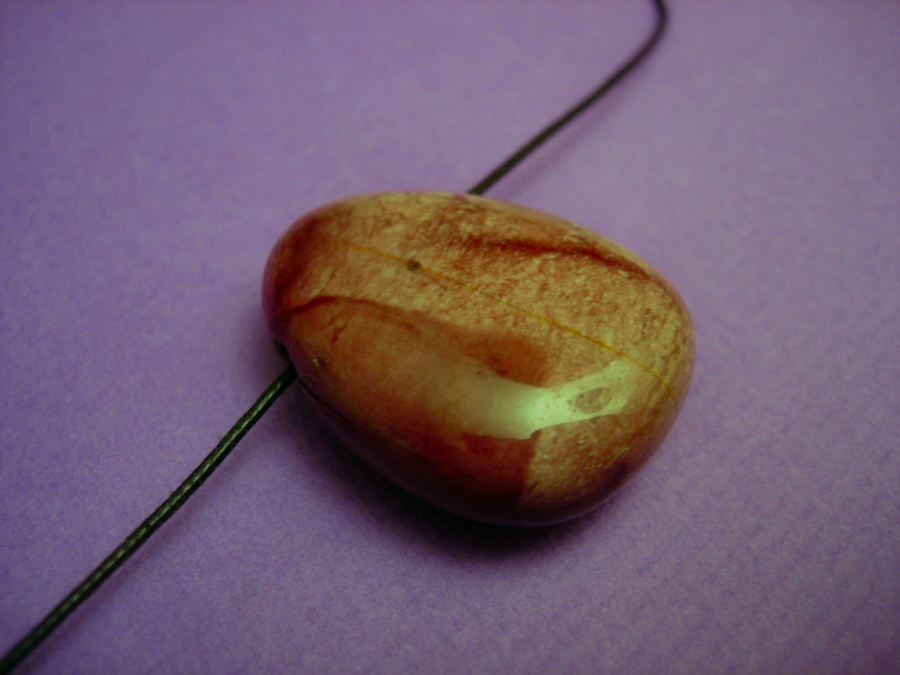 Zdjęcie przedstawiające biżuterię z jaspisem English | polski | +/−